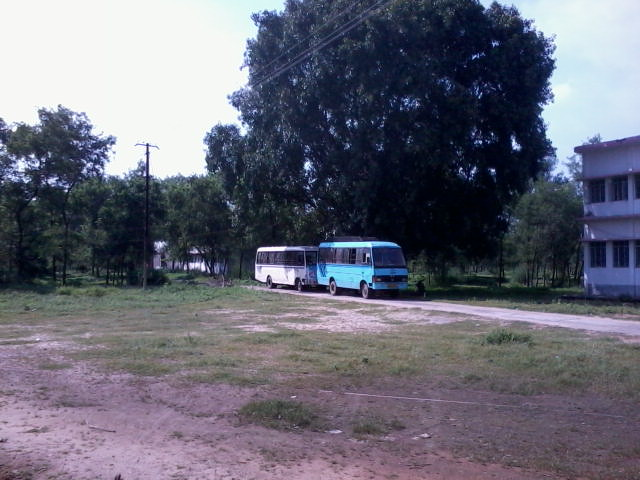 Transport